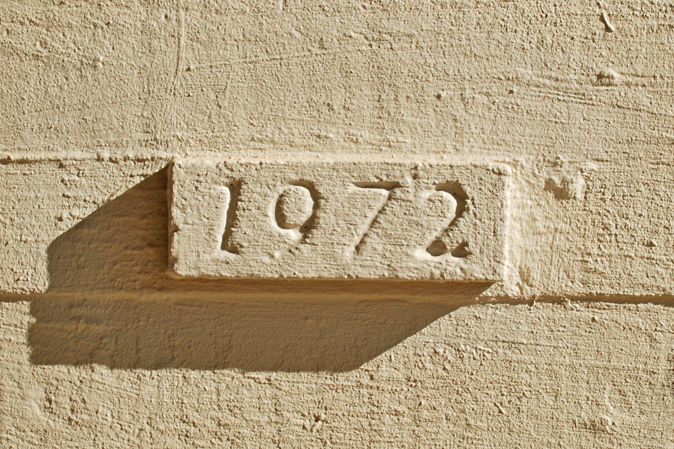 Belgique - Louvain-la-Neuve - Place des Sciences - restaurants universitaires